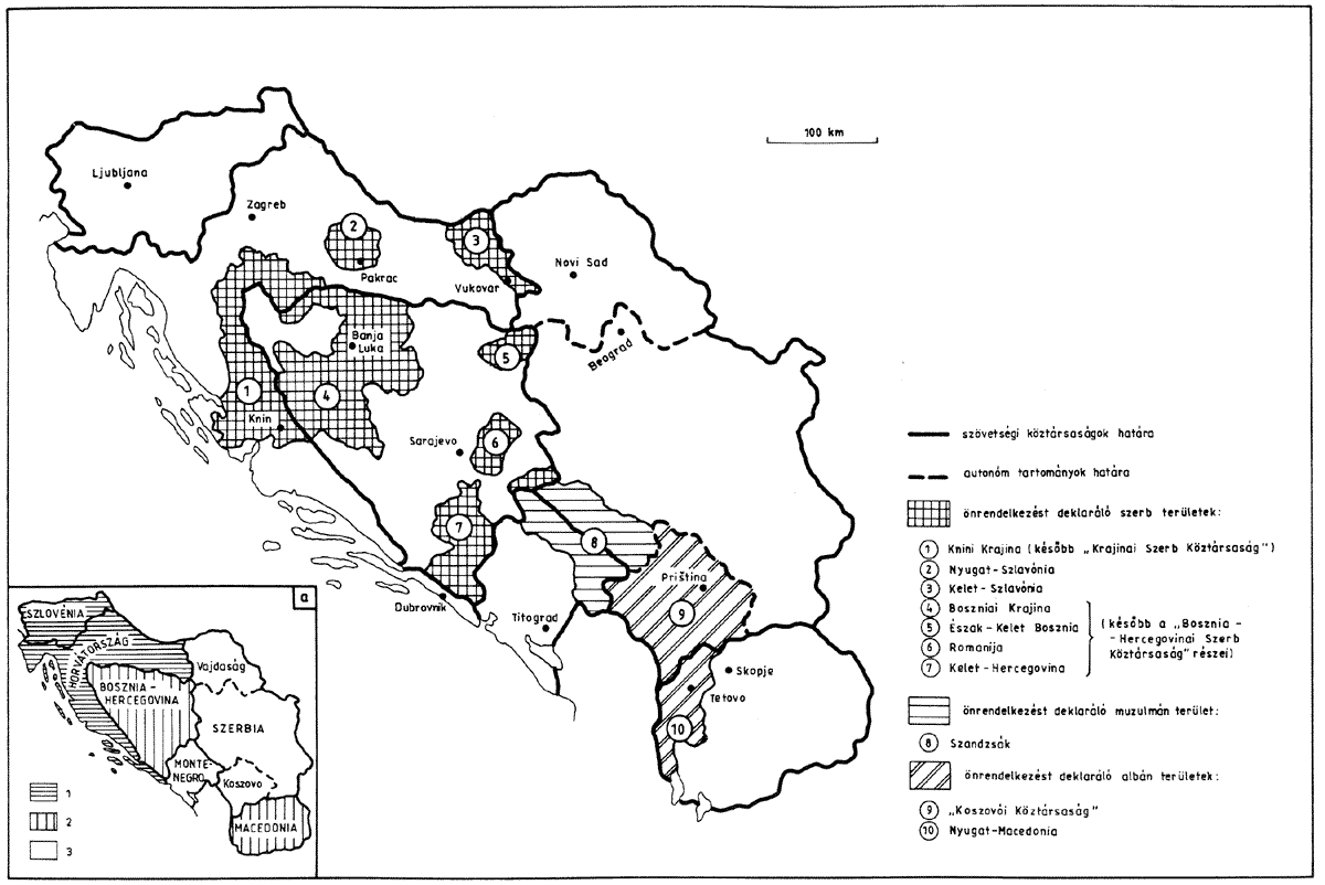 map of serbian autonomus okrugs